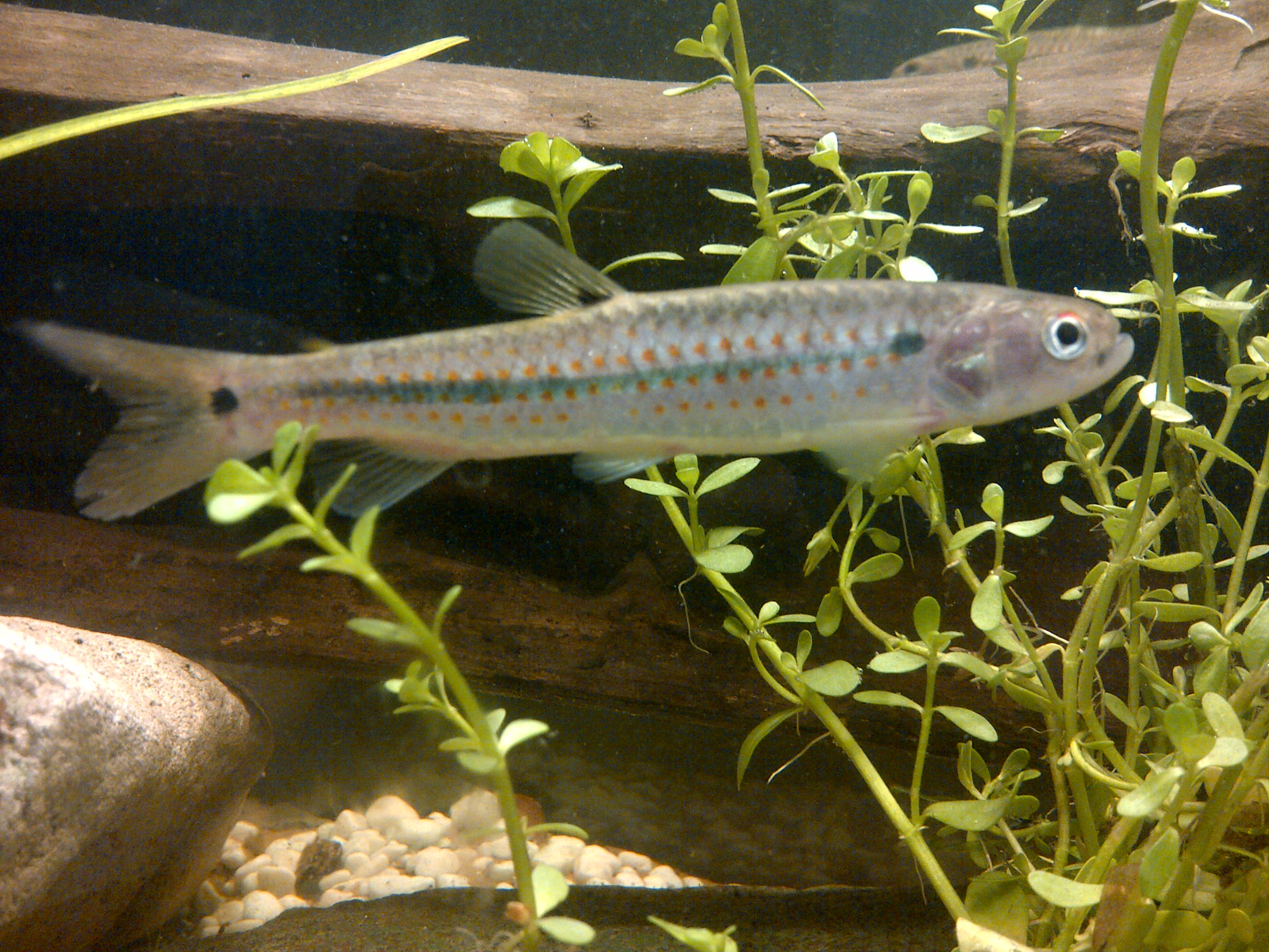 "Carpa Criolla" en un acuario.